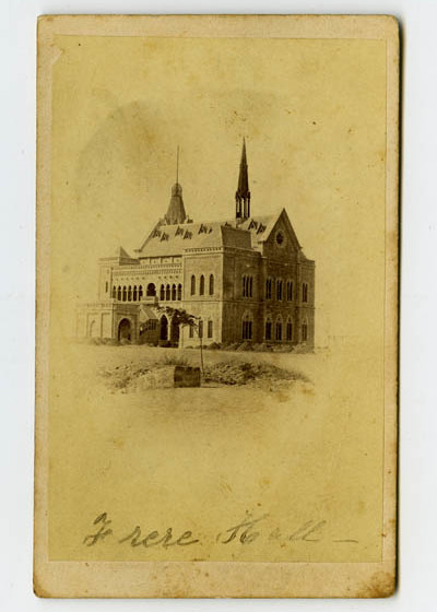 Frere Hall, Karachi, Sindh, Pakistan. c1860s.